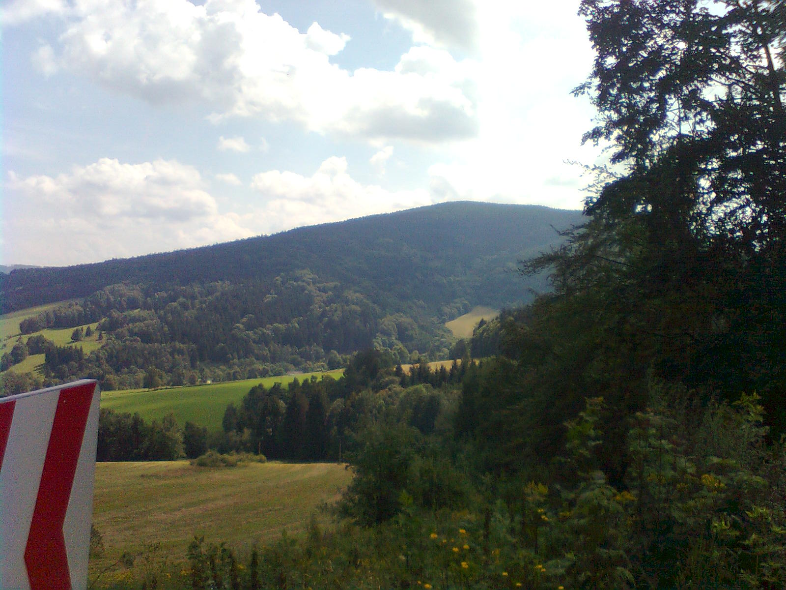 Widok z pętlicy drogi na Ondřejovice na górę Příčný vrch